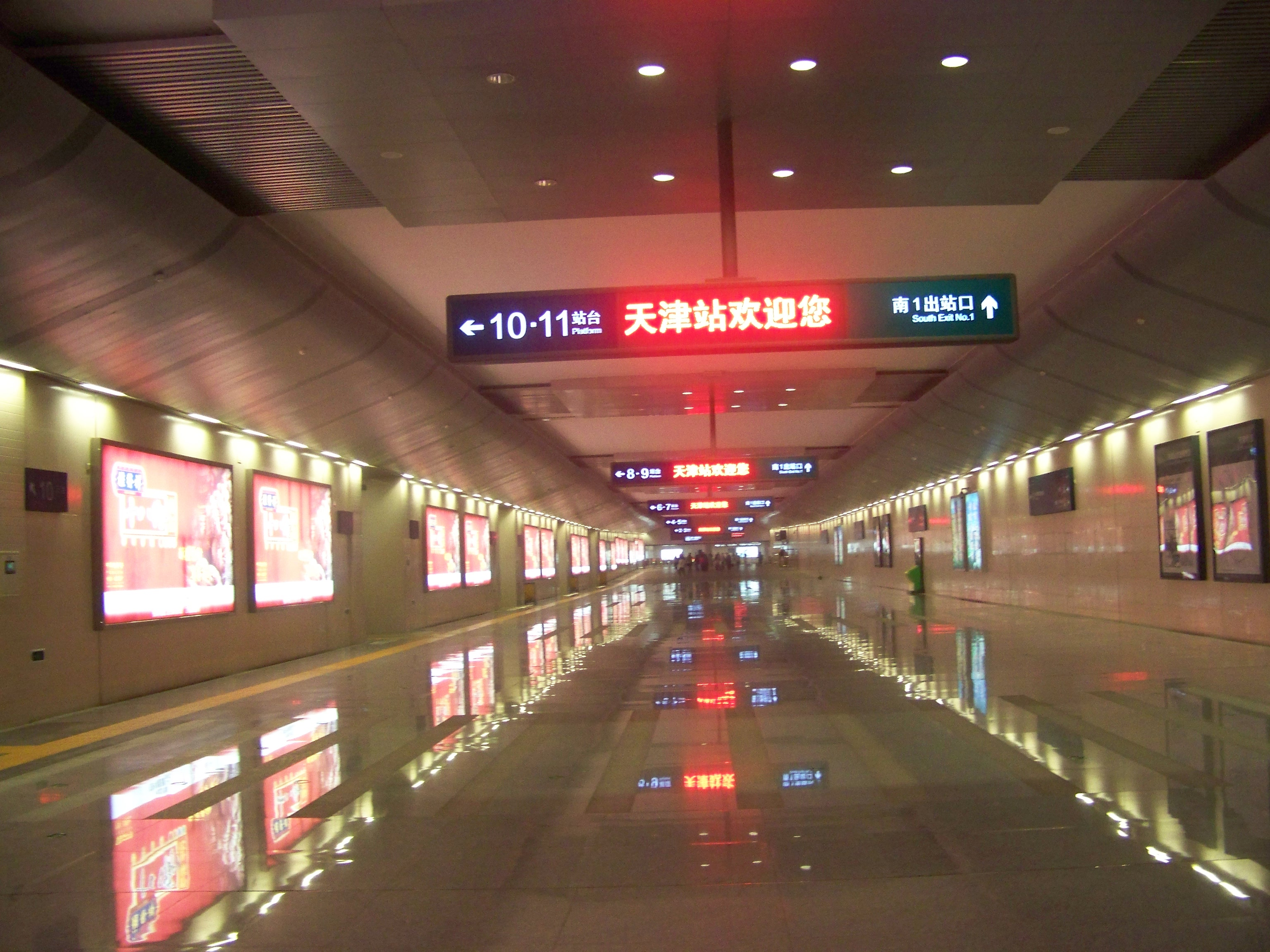 天津站出站通道